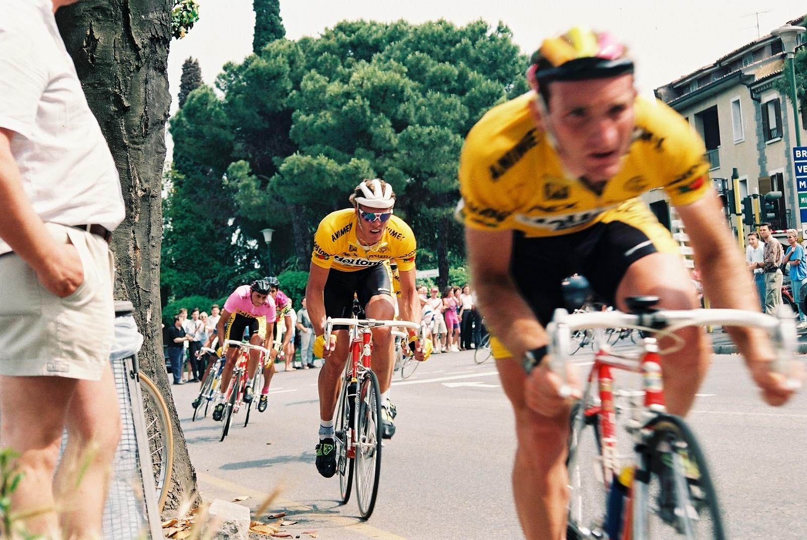 19_Colombare Mario Cipollini